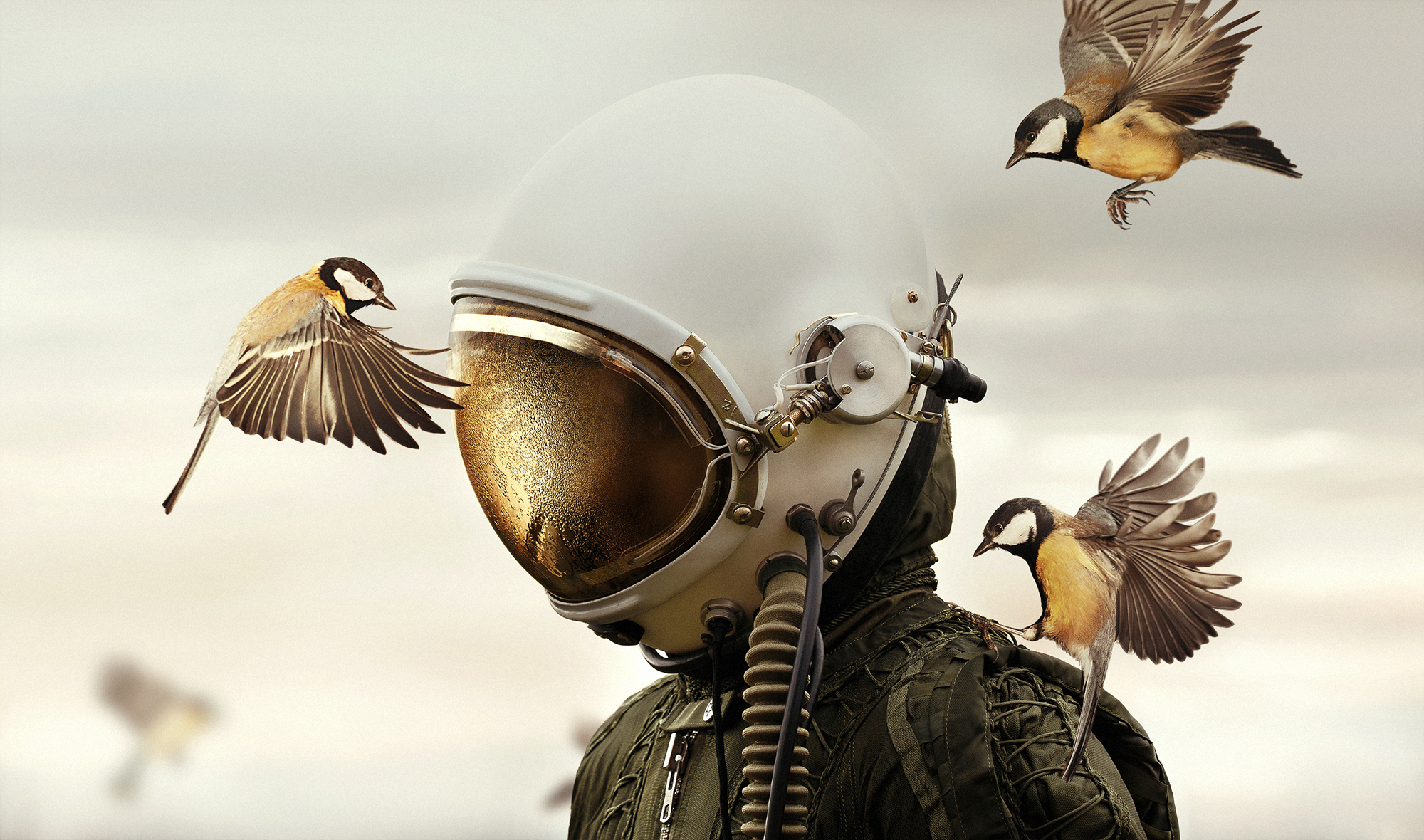 Snímek českého fotografa Martina Stranky, který obdržel 1. místo v celosvětové soutěži Sony World Photography Awards